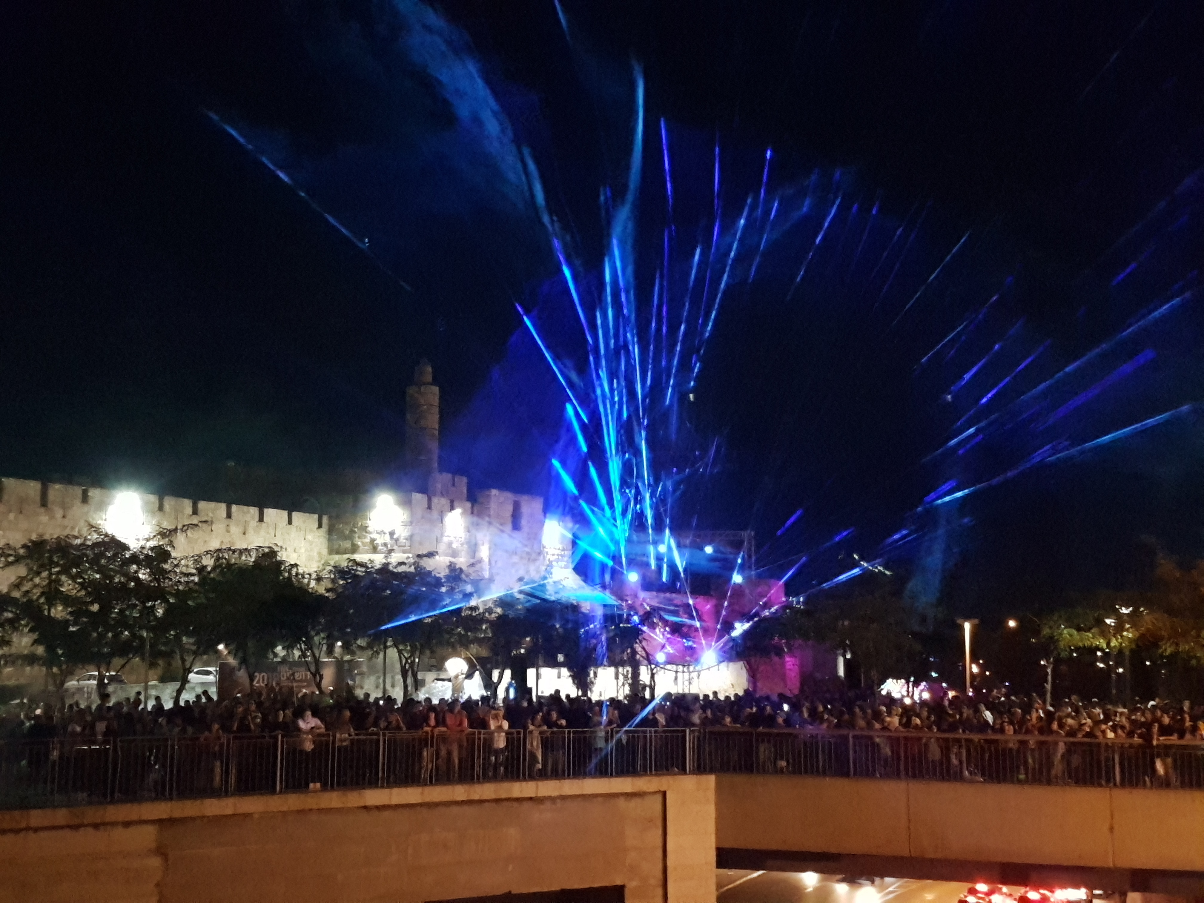 פסטיבל האור בירושלים במייצג מול מגדל דוד